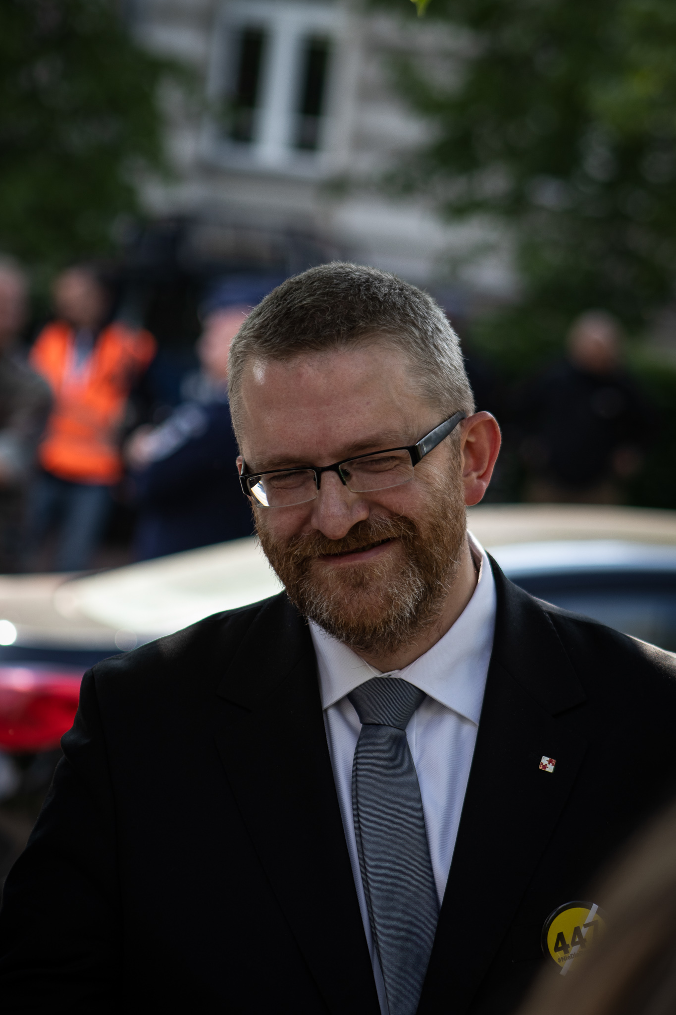 Grzegorz Braun marsz przeciwko 447